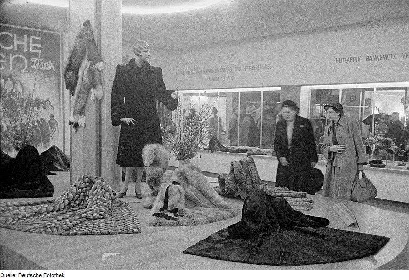 Original image description from the Deutsche FotothekVerschiedene Pelzmäntel am Messestand des VEB Rauchwaren-Zurichterei und -Färberei Naunhof